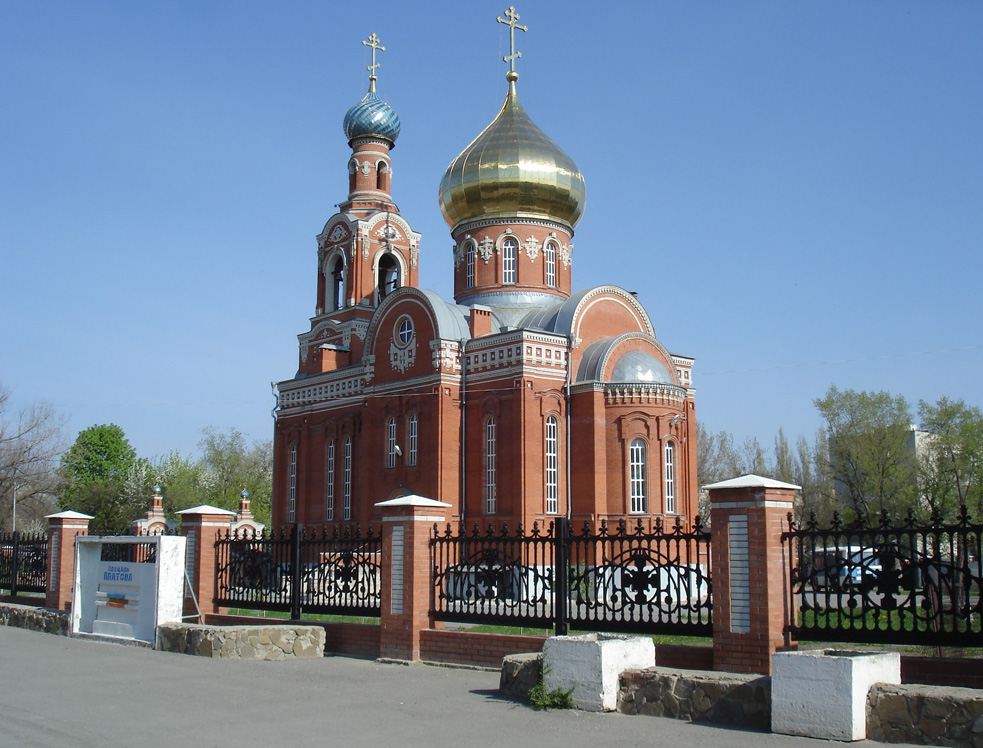 Церковь Каменска-Шахтинского (Свято-Покровский храм)